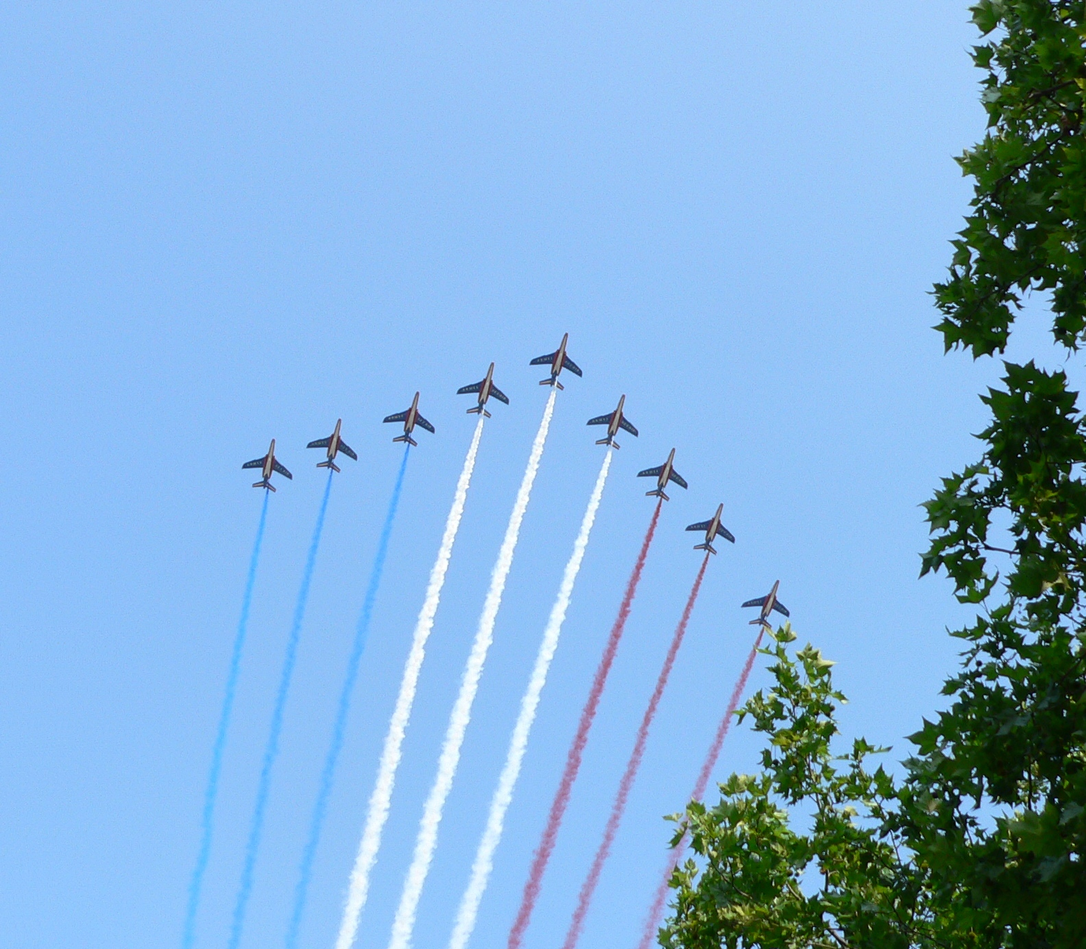 Patrouille de France. Military parade, Avenue des Champs-Élysées (Paris), 14 July 2006